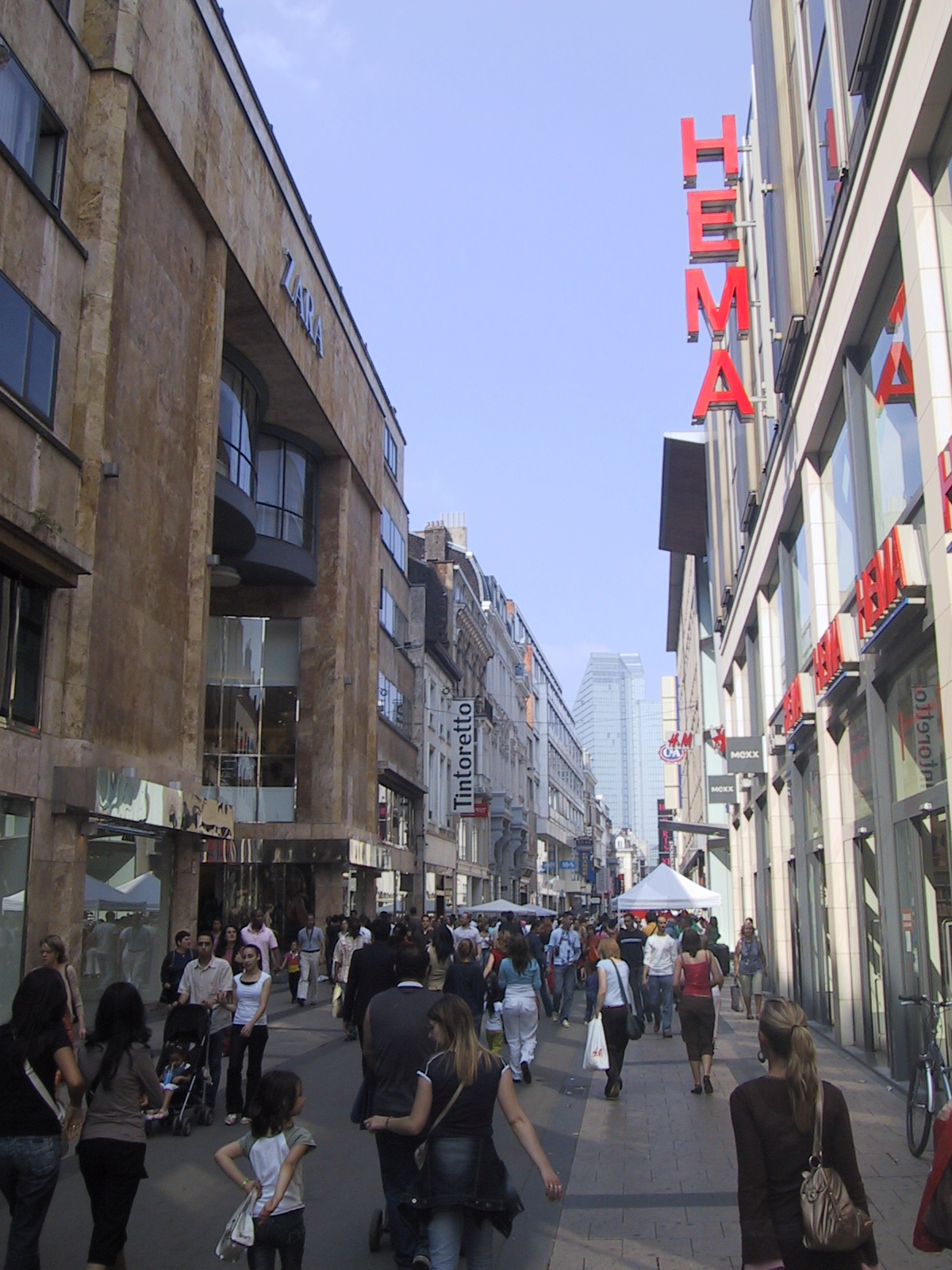 Nieuwstraat (Rue Neuve) in Brussels on a busy day